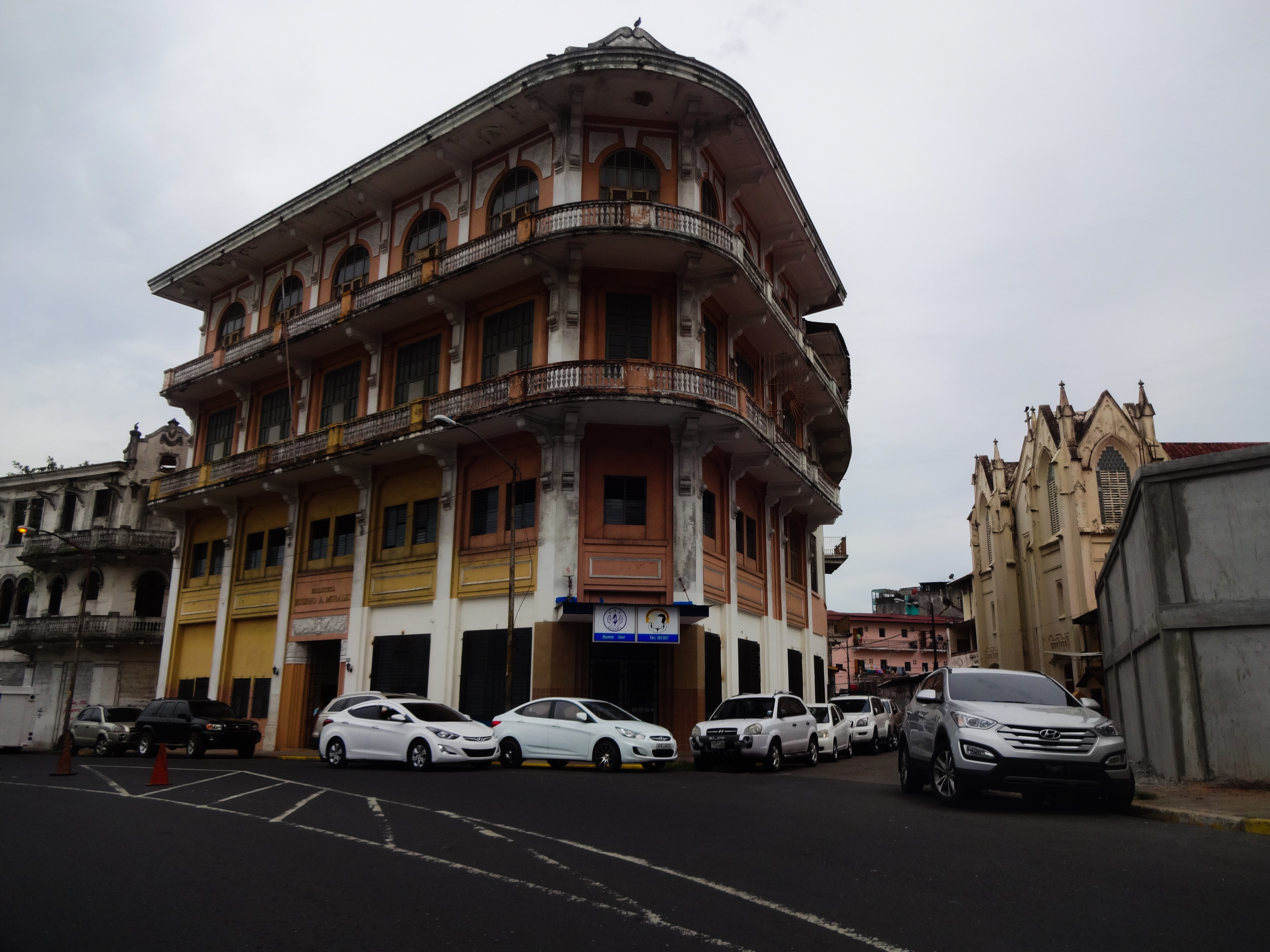 Ubicada en Calle L Santa Ana, frente a la Asamblea Legislativa de Panamá